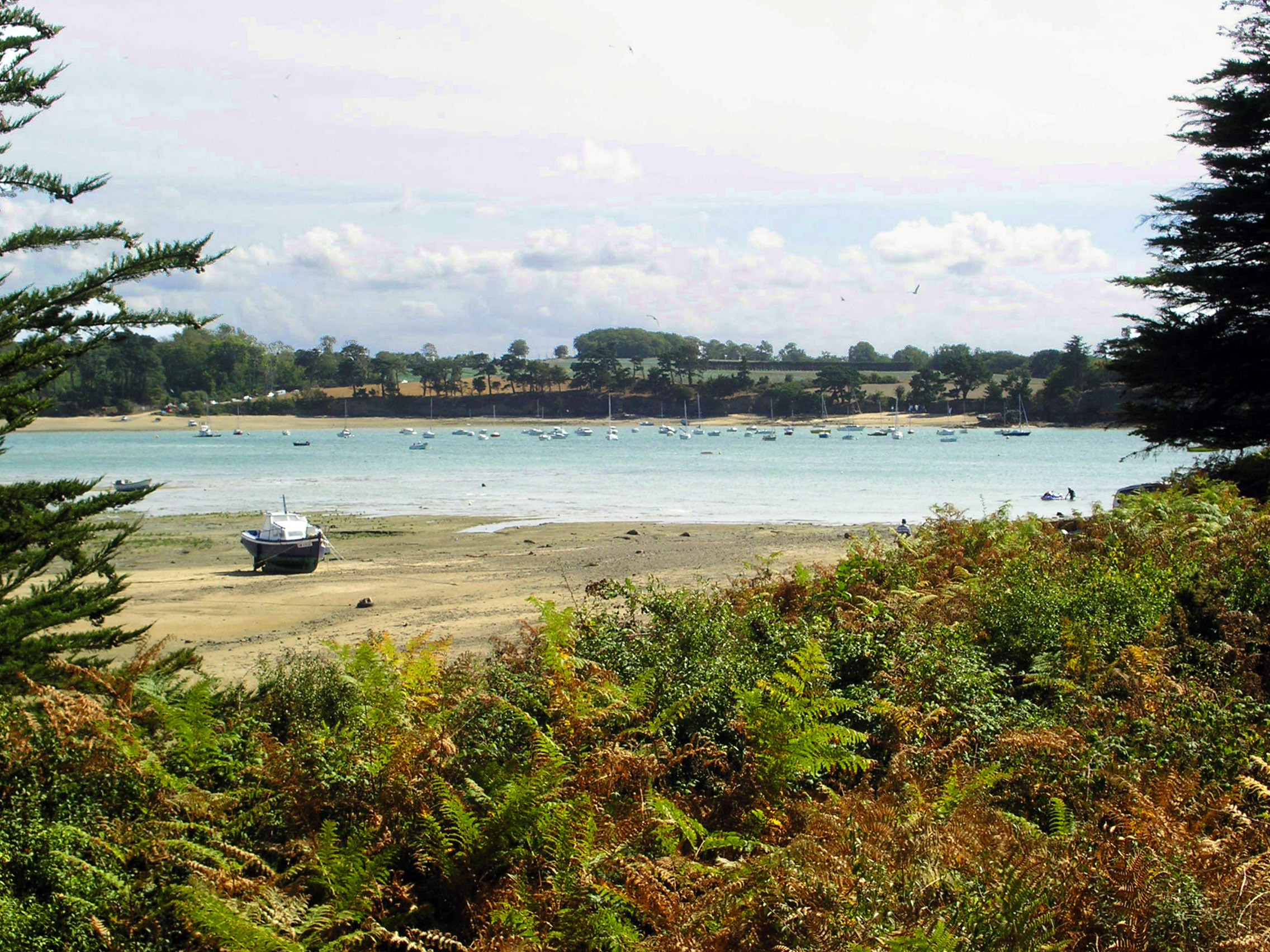 Havre de Rothéneuf vu de l'île Besnard (Saint-Coulomb, France) (vue vers le sud-ouest)